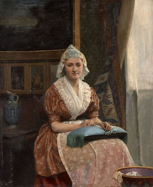 La brodeuse